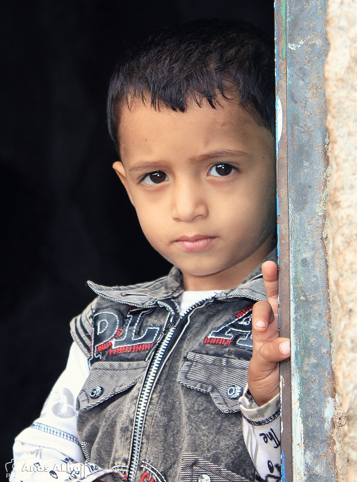 By: AnasALhajj.Photography